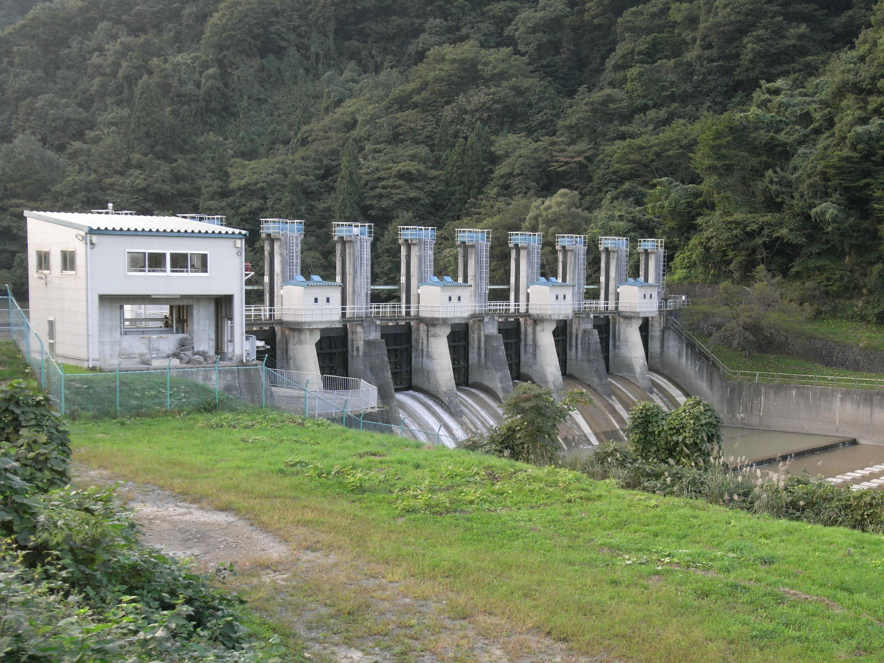 Dam